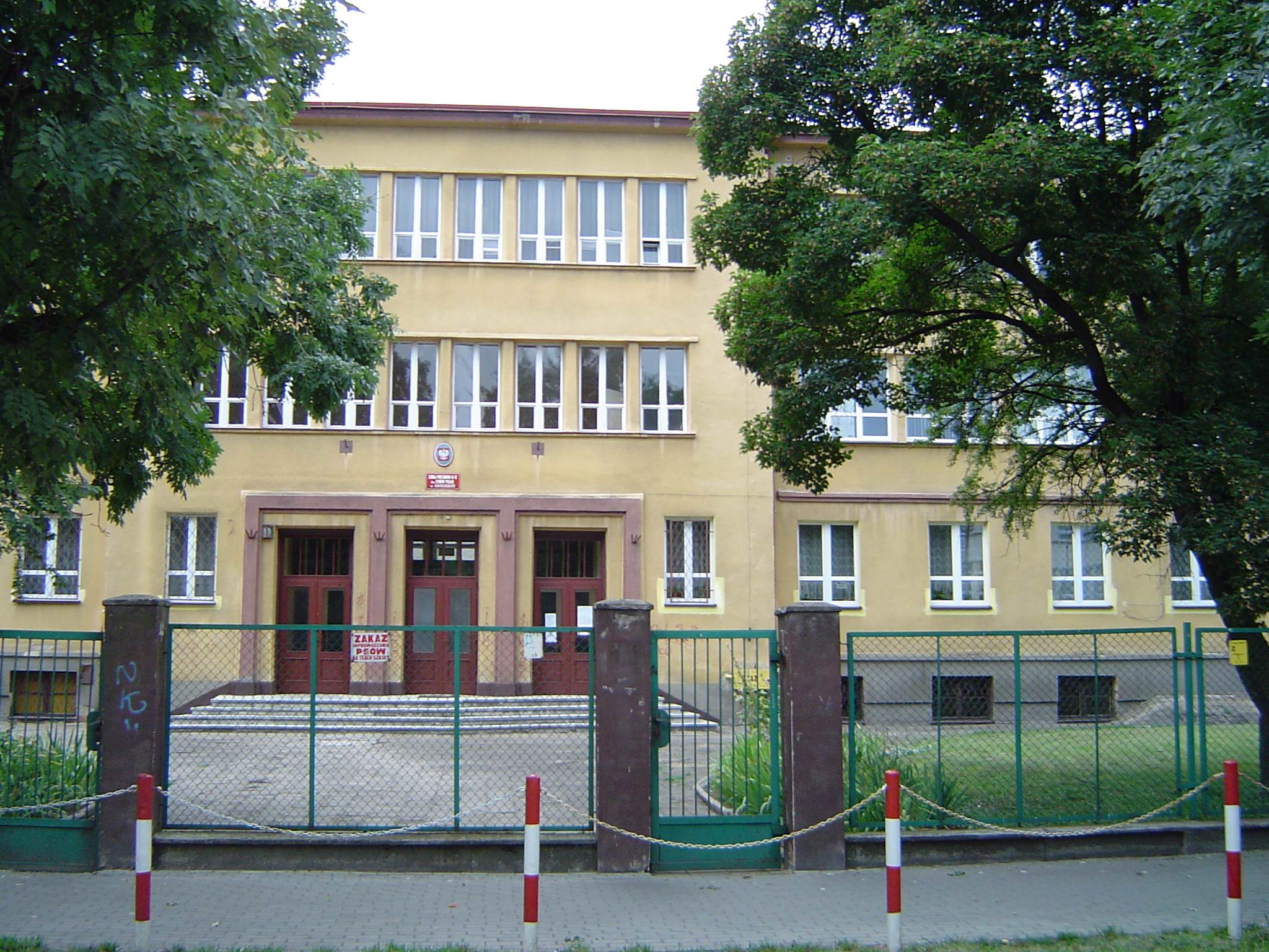 Szkoła Podstawowa nr 12 w Grudziądzu